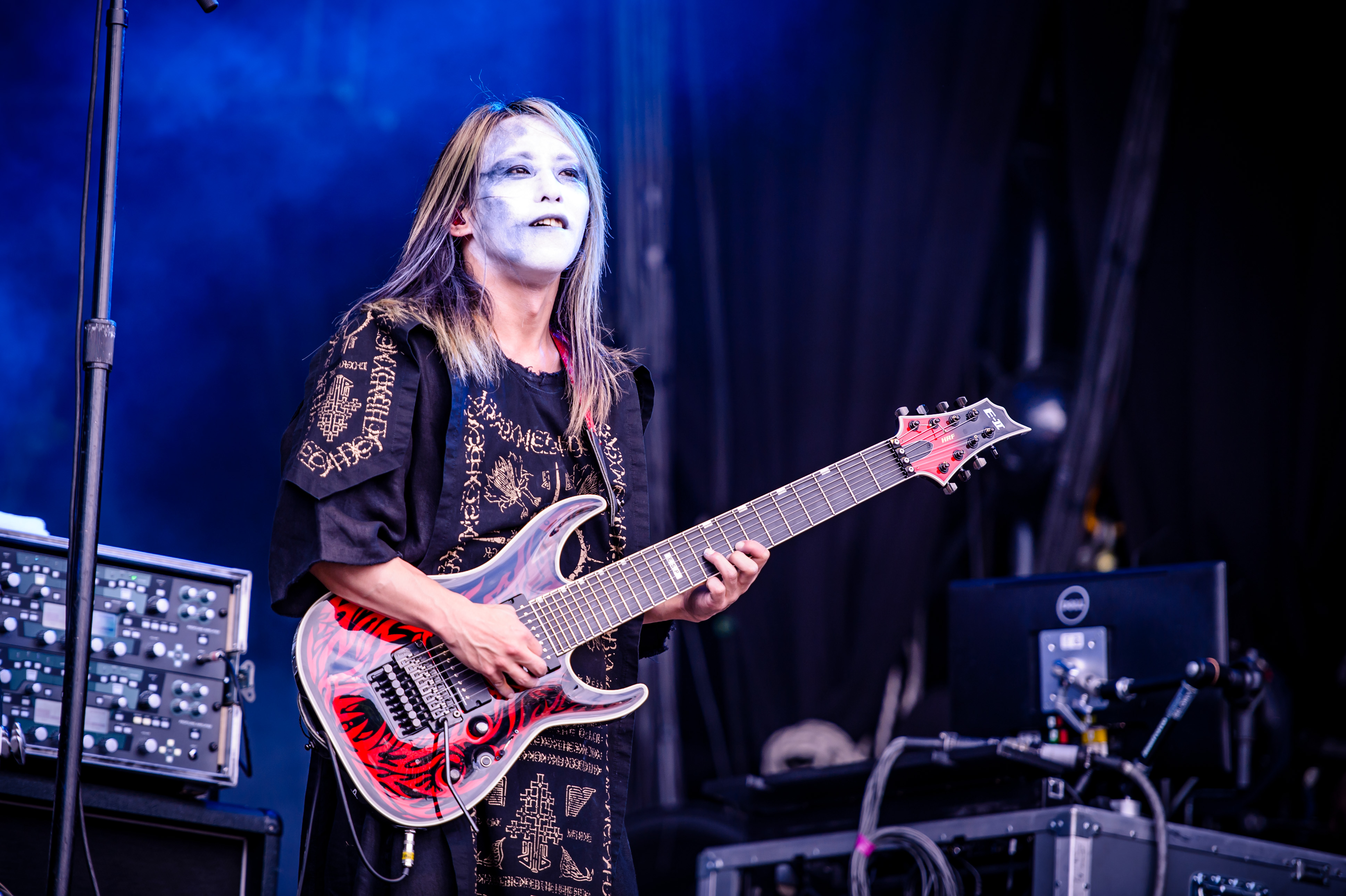 'Rock im Park 2018; Zeppelinfeld Nürnberg': 'Baby Metal'